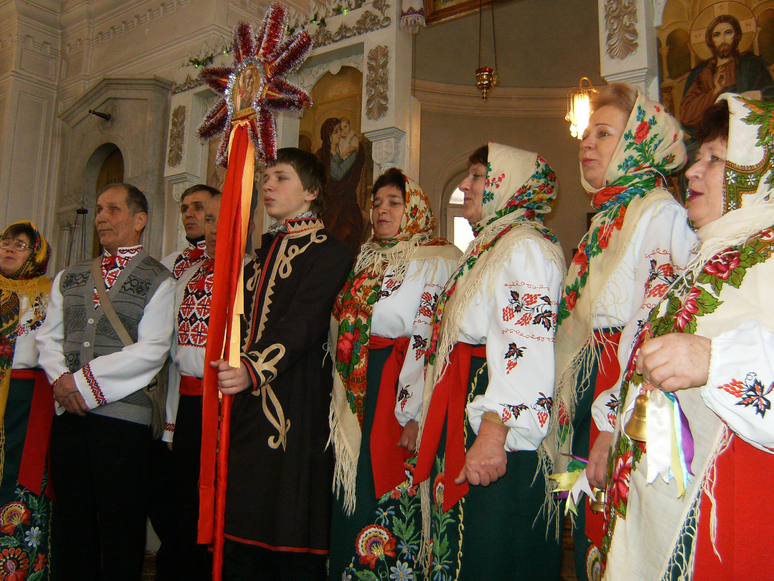 Вертеп: Різдвяний вертеп у храмі св. мучениці Олександри, м. Херсон